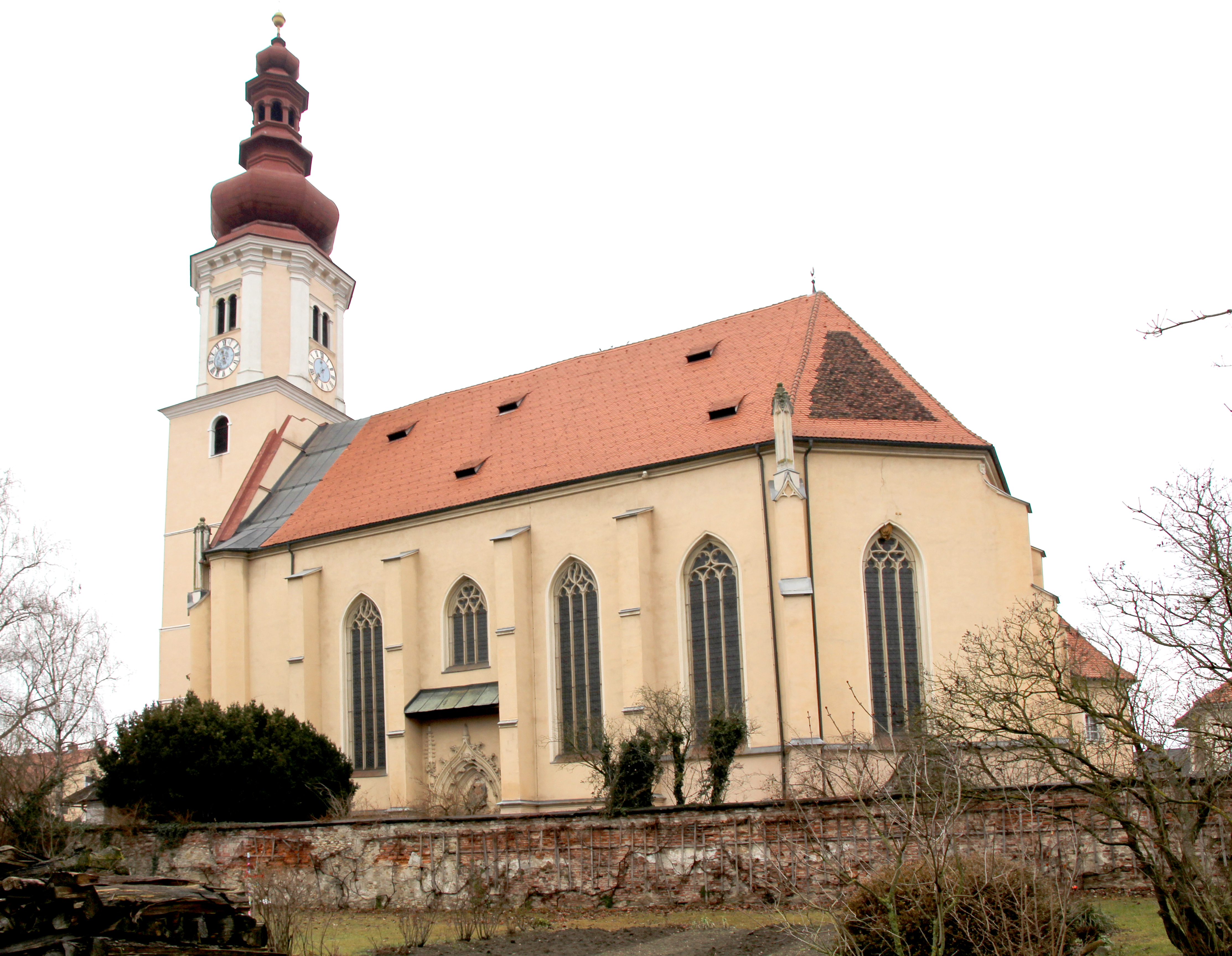 Kath. Pfarrkirche, Wallfahrtskirche Maria Trost mit Kirchhof und Ummauerung